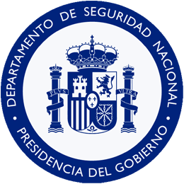 Logotipo del Departamento de Seguridad Nacional